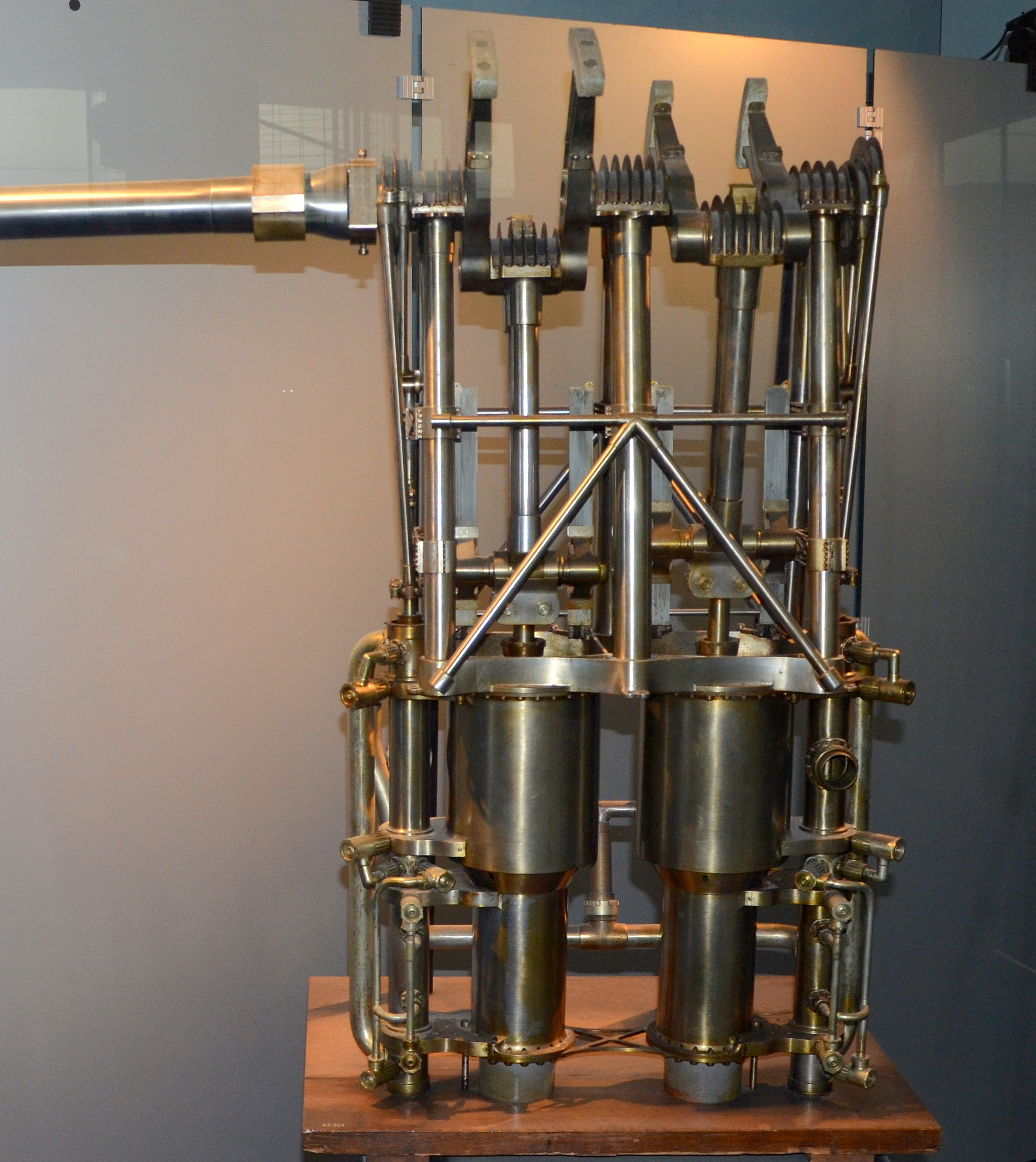 Moteur a vapeur réalisé par Clément Ader en 1892 pour motoriser l'avion n°2 "Zéphir". Le moteur entièrement en acier et usiné est composé de 2 tandems de 2 cylindres (haute et basse pression) situés dans le prolongement l'un de l'autre. Dans les cylindres se déplacent 2 pistons de diamètres différents solidaires de la même bielle attelée au villebrequin. Le moteur fournit une puissance normale de 30 chevaux et une puissance maximum de 37 chevaux à 480 tr/minutes avec 15 kg de pression. La masse du moteur nu est de 33 kg avec la chaudière et les accessoires de 134 kg.